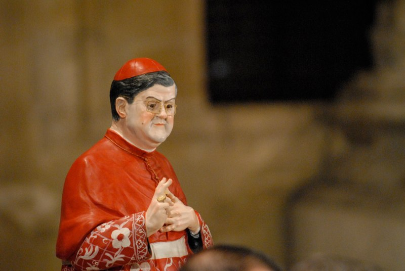 Statua del Card. Crescenzio Sepe nella chiesa di S. Chiara a Napoli